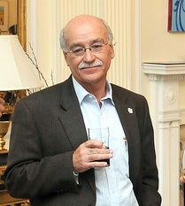 Ney Castillo, Presidente de la Federación Uruguaya de Basquetbol